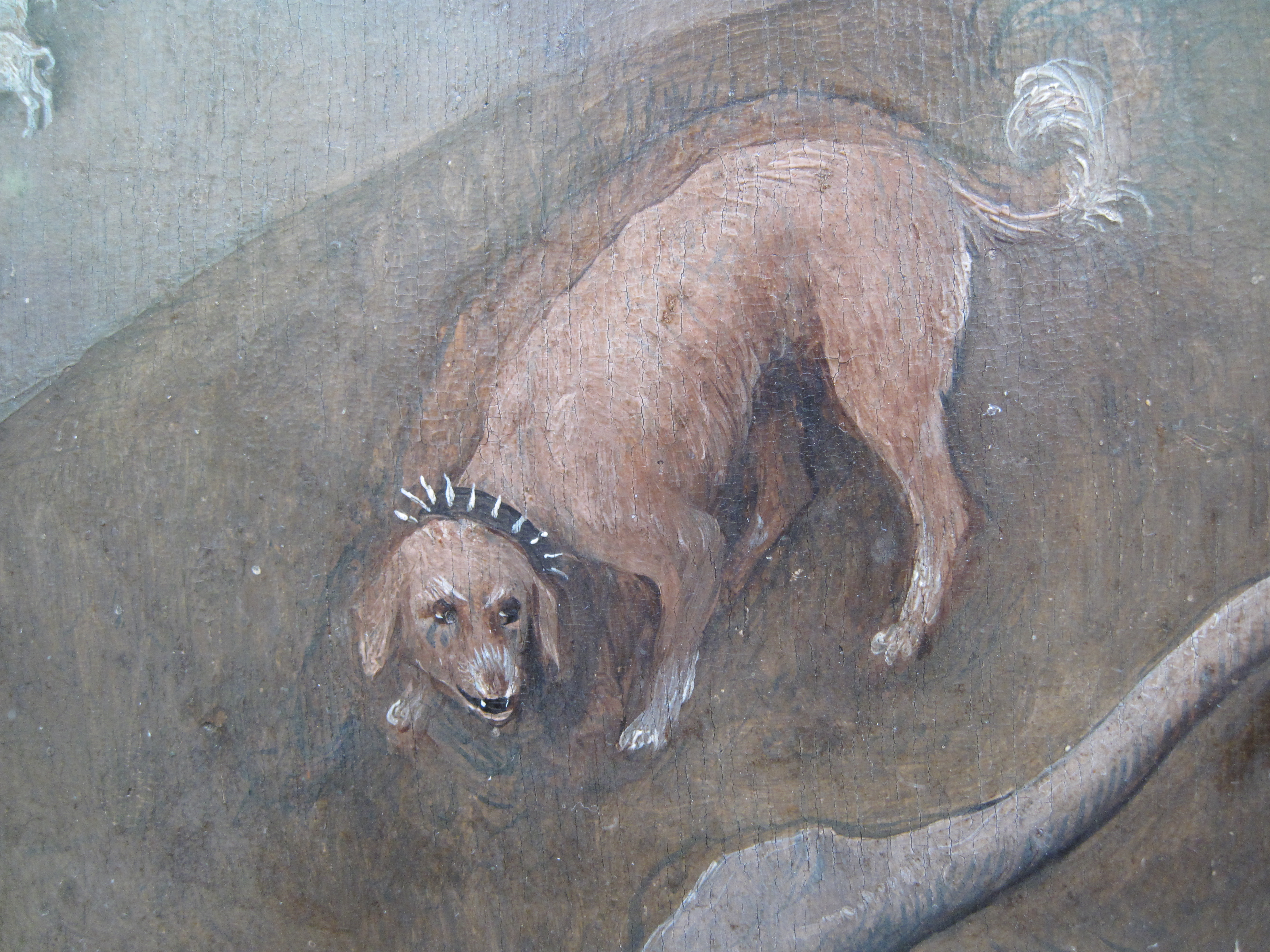 De Marskramer, Bosch (Collectie 15de-17de eeuw, zaal 6) Detail 16005 De Marskramer, Bosch (Collectie 15de-17de eeuw, zaal 6) Boijmans